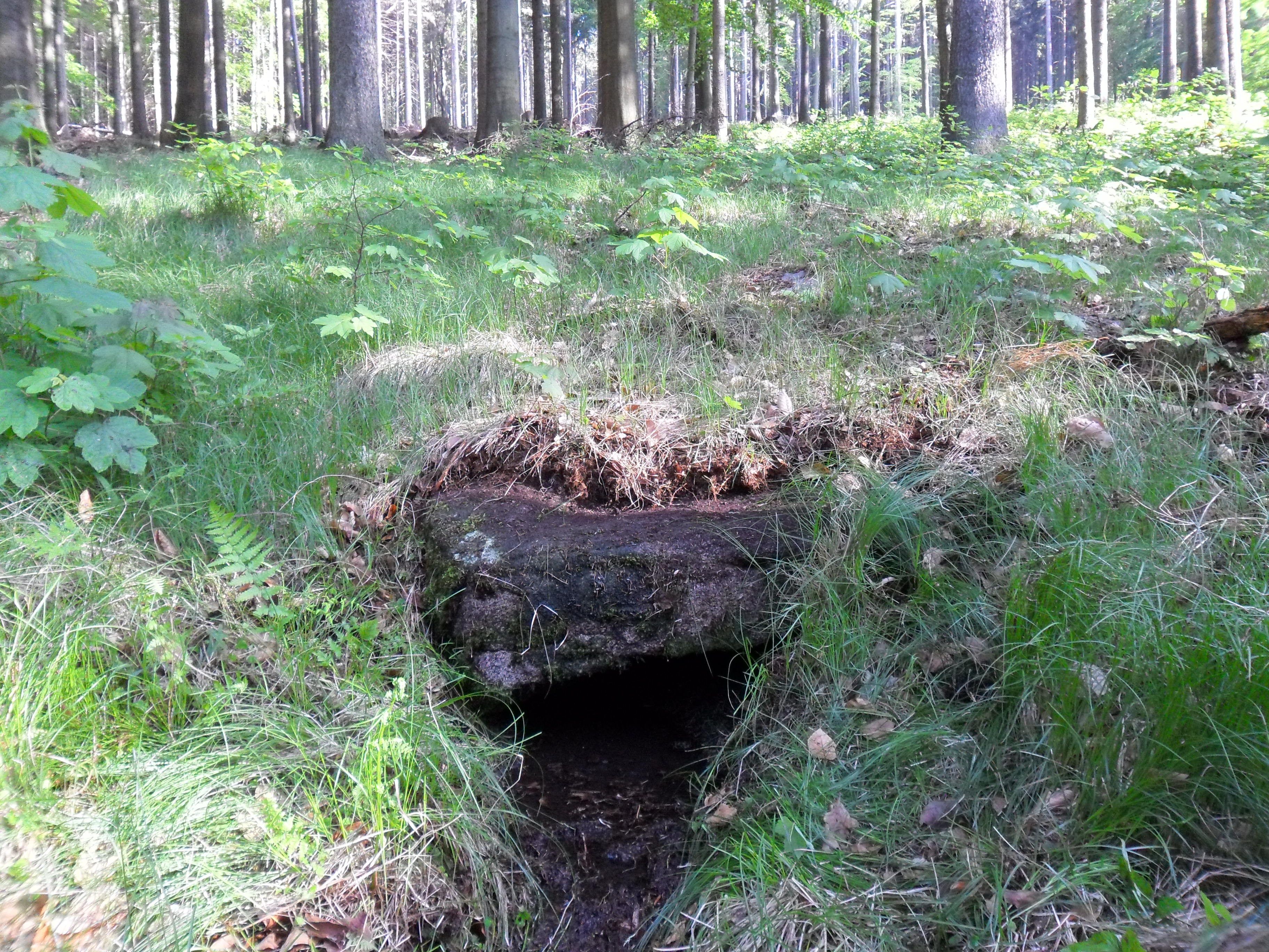 Albrechtsbachquelle - am Nordhang des Czorneboh auf 380 m ü. NN